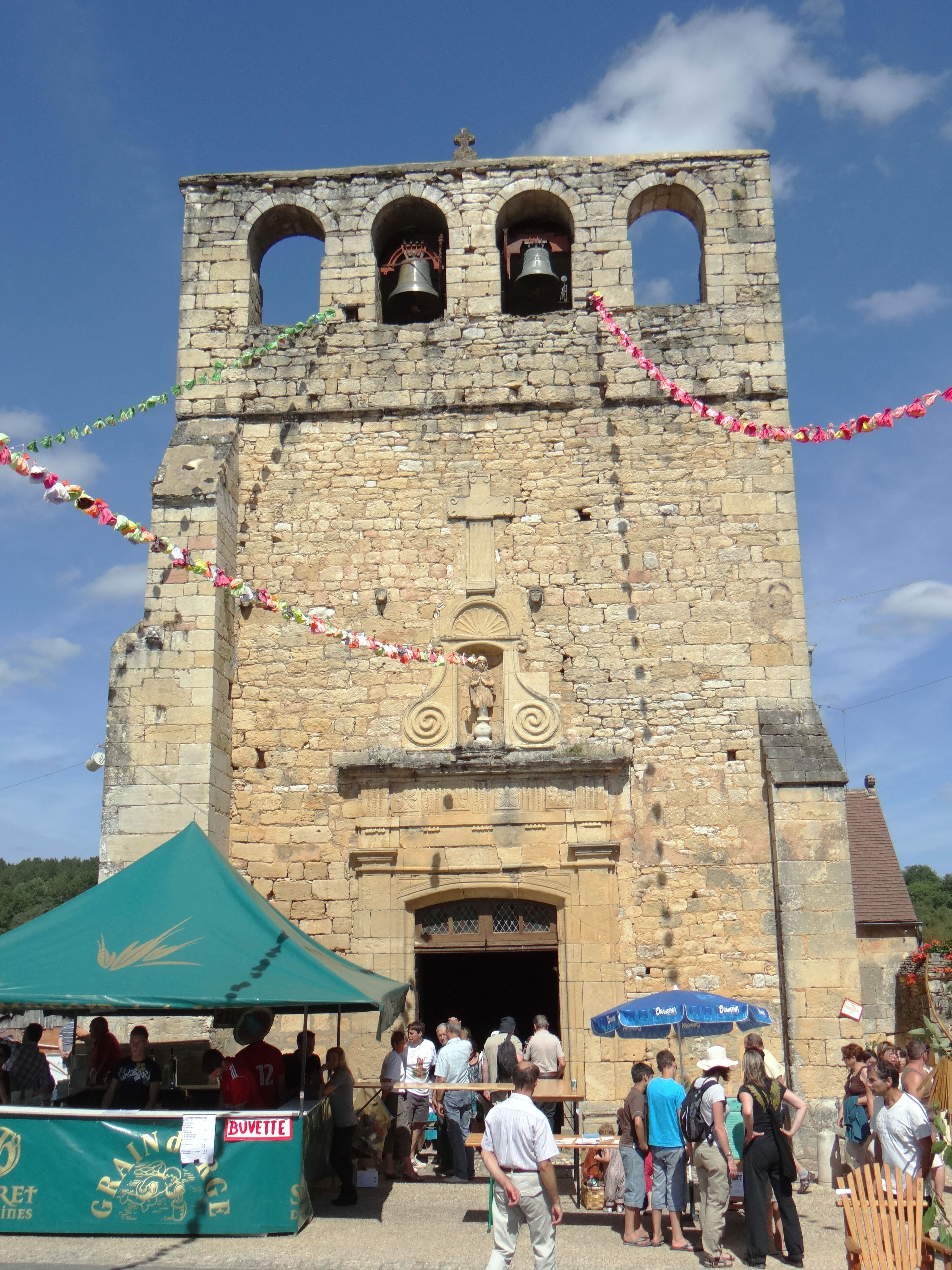 Eglise Saint-Eutrope de Meyrals pendant le Festival des épouvantails 2012